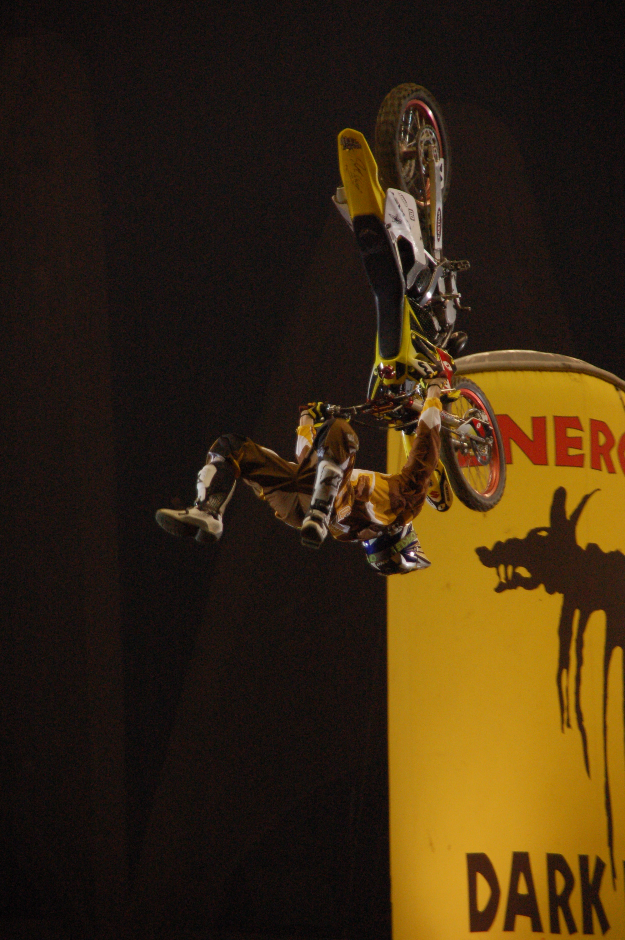 photo de Tom Pagès prise lors de la demo freestyle du 8e supercross de lyon